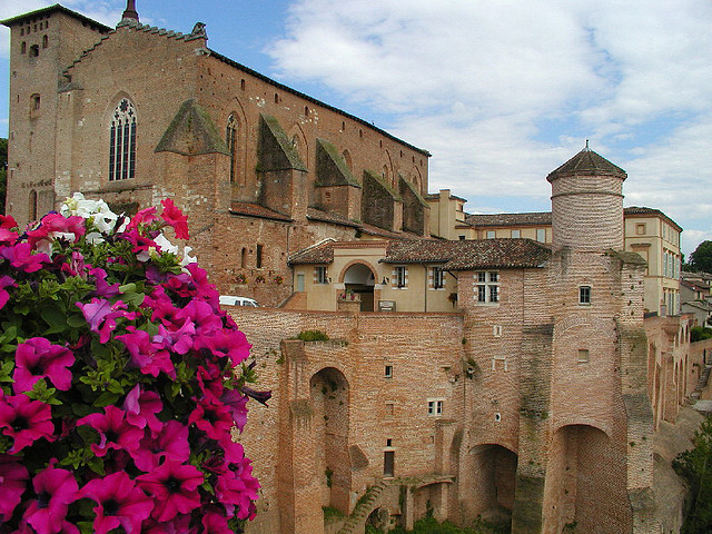 Abbaye Saint-Michel à Gaillac